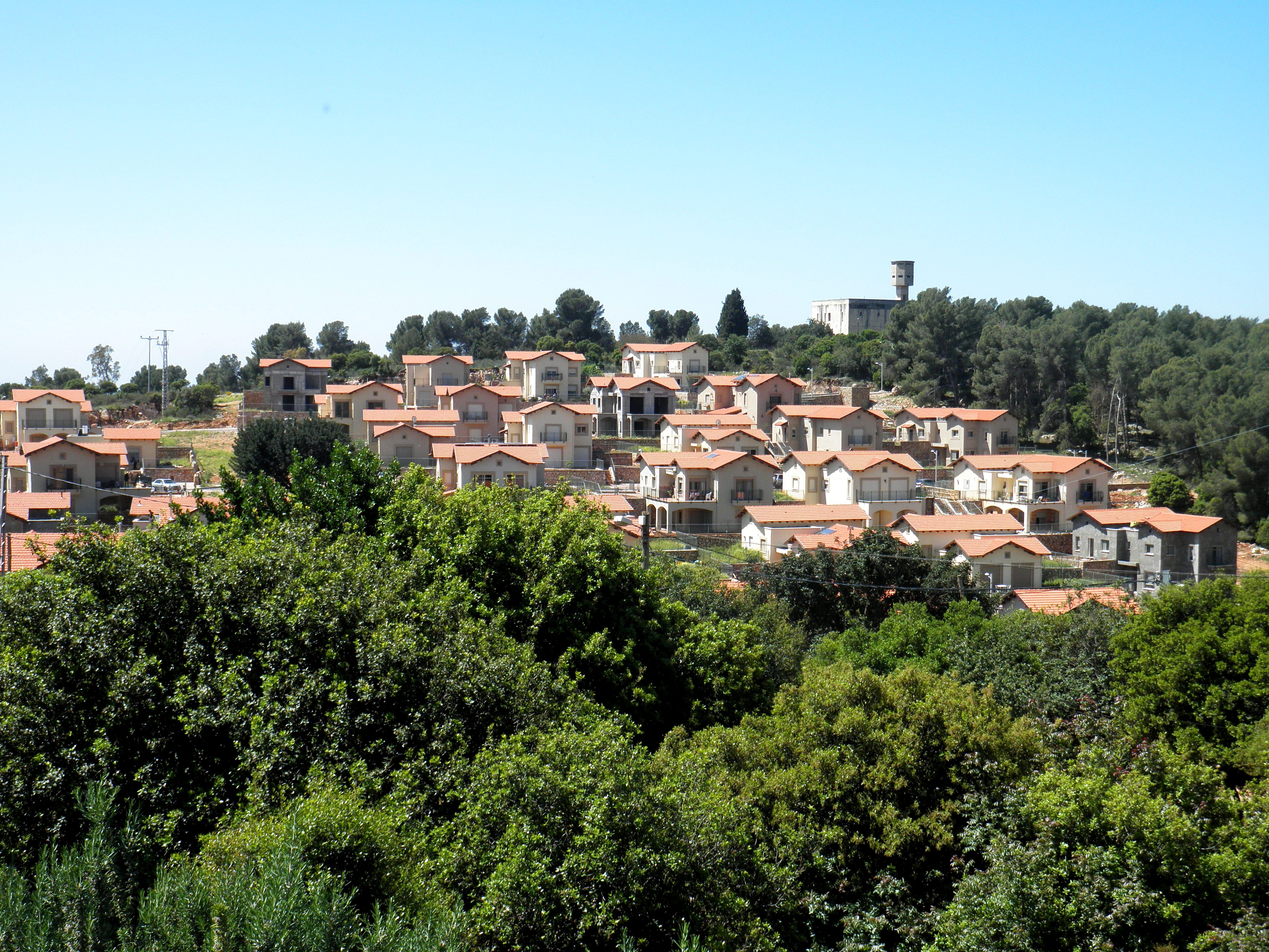 מצודת טיגארט מעל מושב שפר